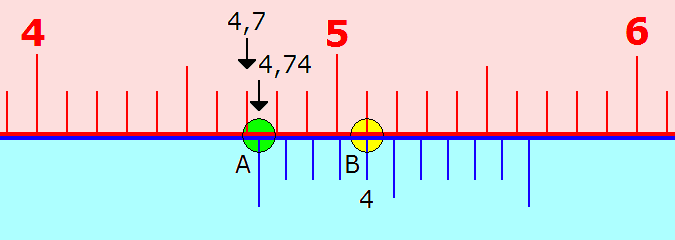 skizo de verniero, por klarigo.